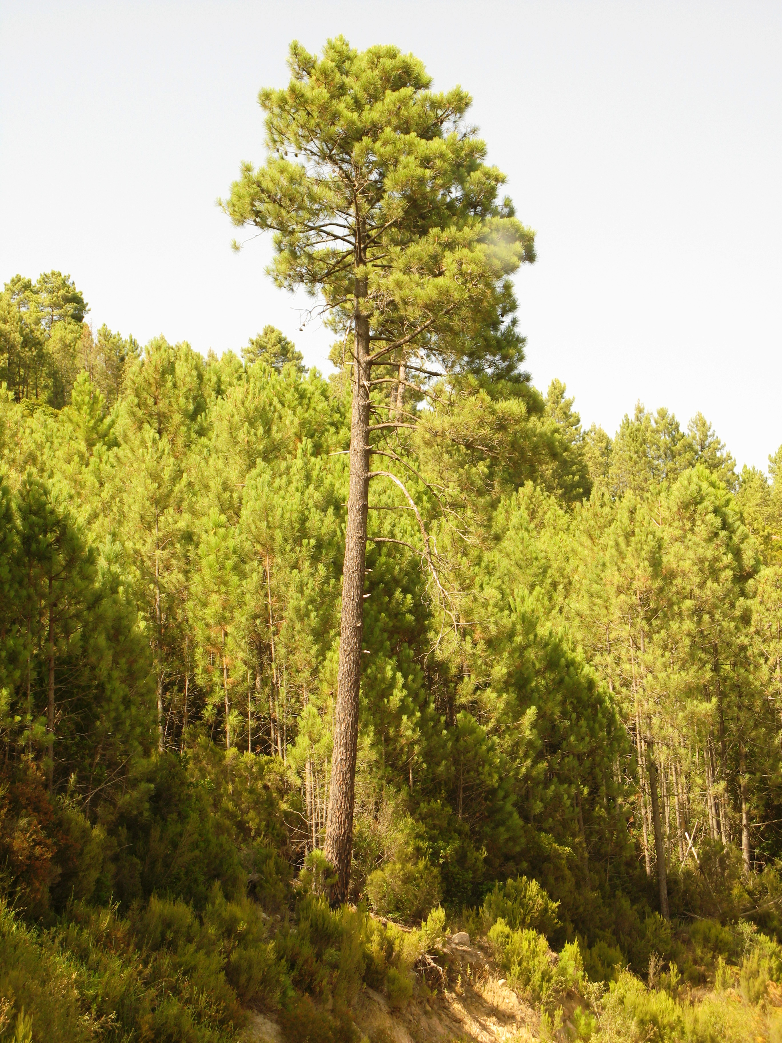 Korsesch Kifer an der Forêt domaniale de Vallemala. Kategorie:Kiferen